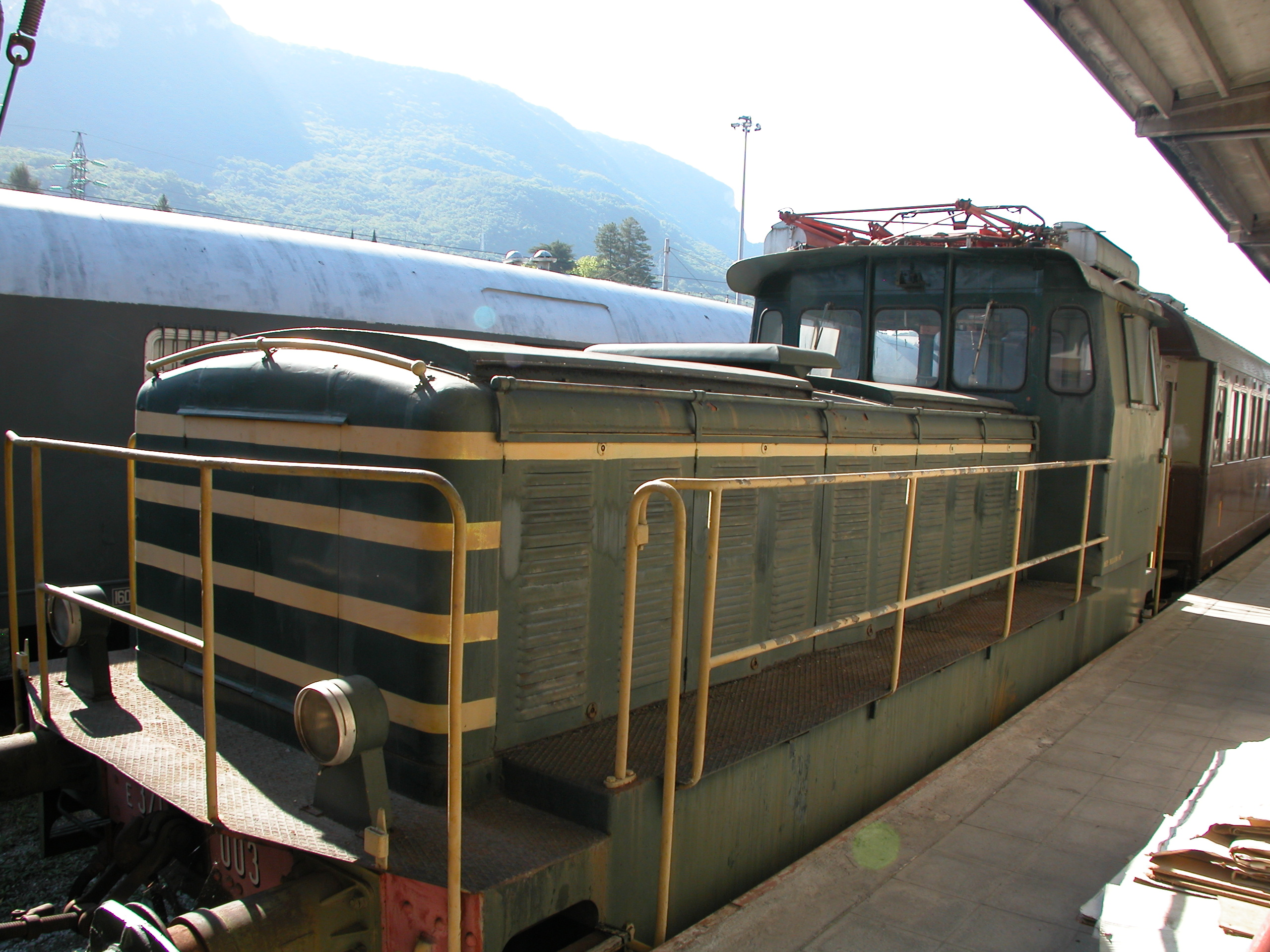 Locomotiva elettrica da manovra FS E.321.003 – Vista dal lato anteriore sinistro.